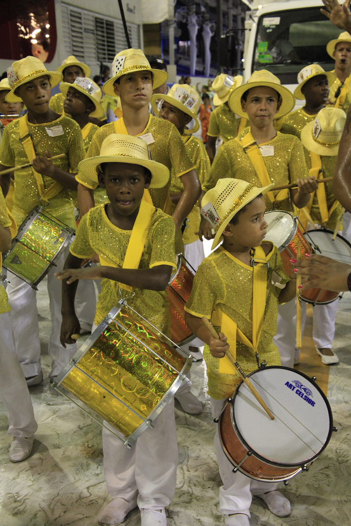 Rio de Janeiro - Pequenos sambistas fecham desfiles na Marquês de Sapucaí.